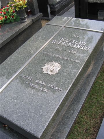 Bolesław Wierzbiański's monument (Powązki Cemetery; Cmentarz Komunalny, d. Wojskowy)